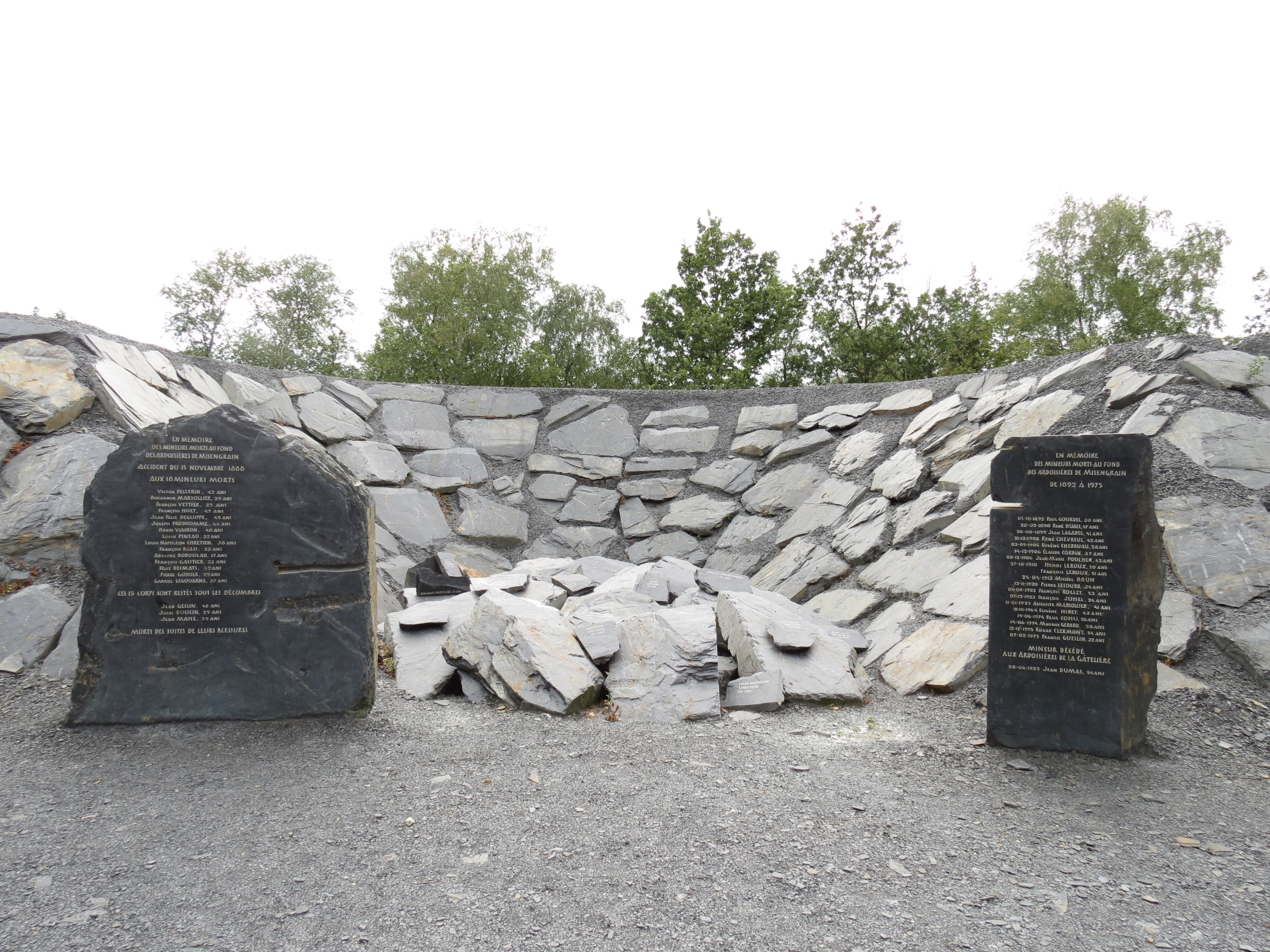 Ancienne ardoisière de Misengrain